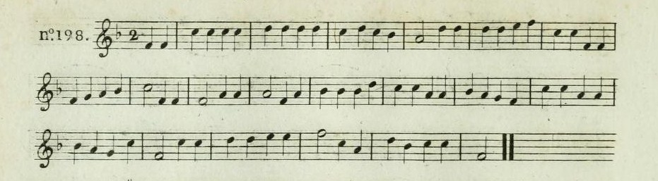 Air du vaudeville de Jean Monnet ou Frère Pierre à la cuisine, n°198 du recueil de timbres La Clé du Caveau, page 88.